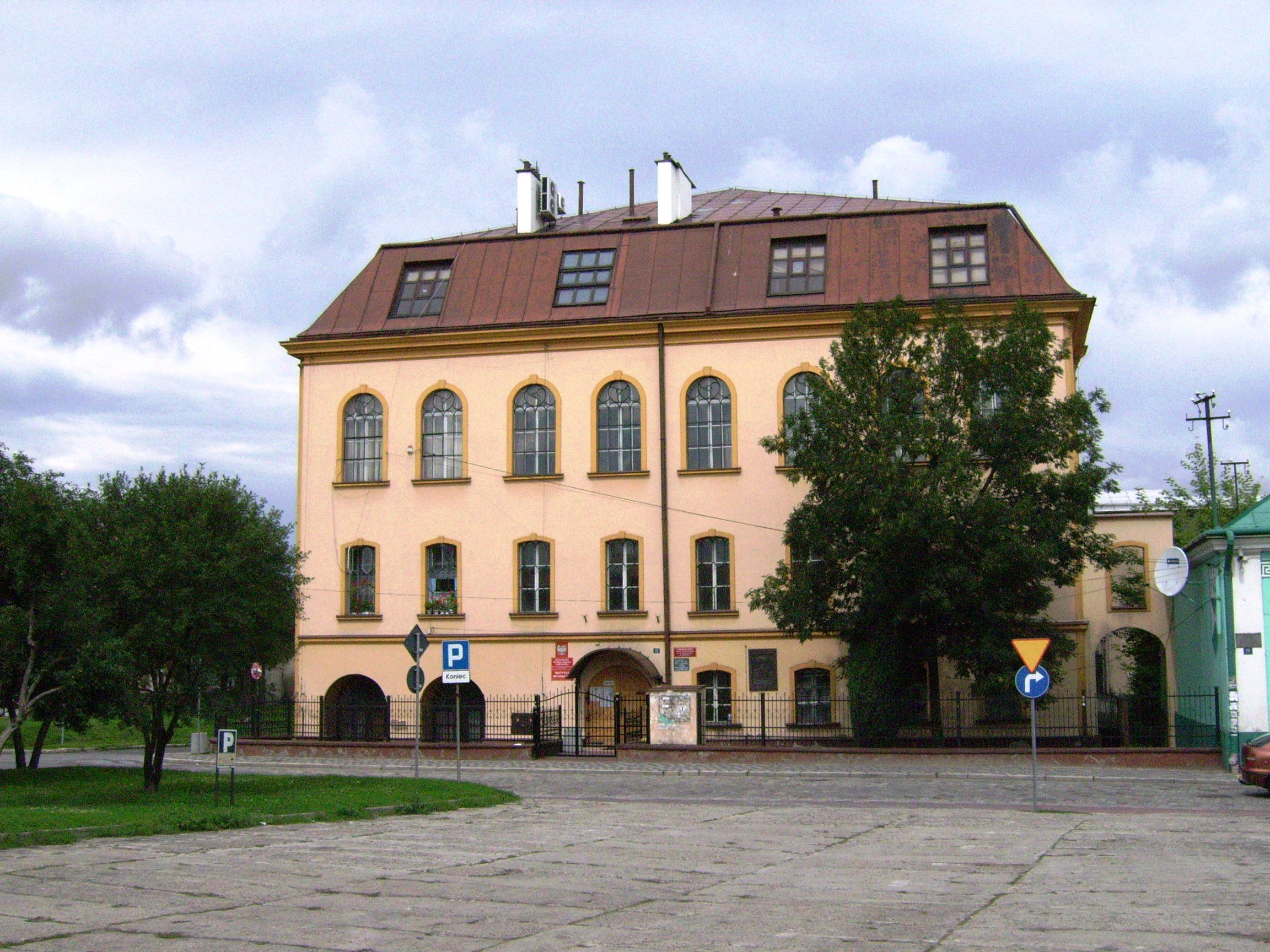 Jarosław, ul. Opolska 12 - Duża Synagoga (zabytek nr A/234)